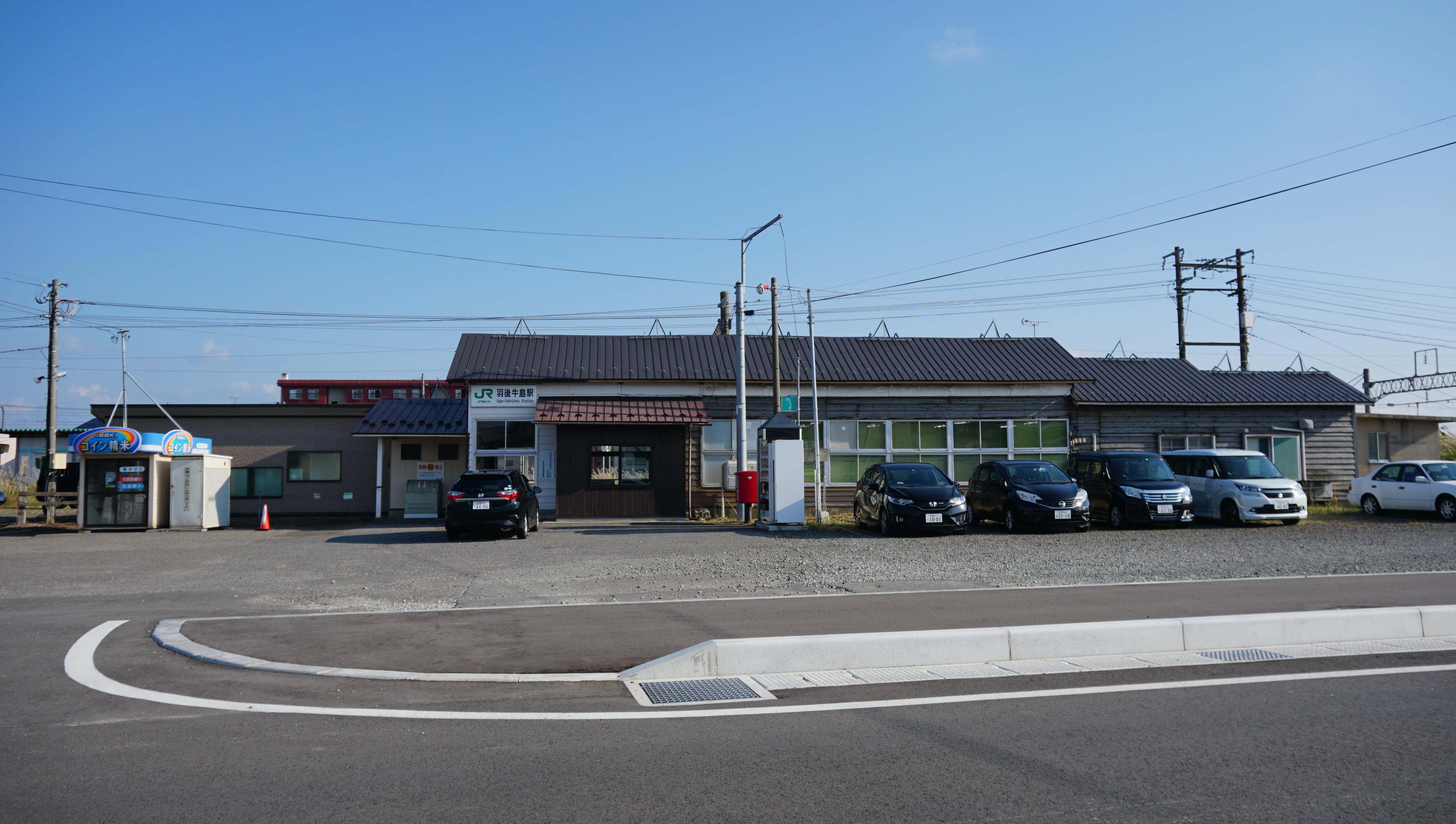 羽越本線 羽後牛島駅（秋田県秋田市）。一見駅舎のように見えるこの建物はかつての駅本屋であり、ＪＲ東日本東北総合サービス（株）秋田用地管理事務所が使用しているのみで駅舎としての機能は持たない。